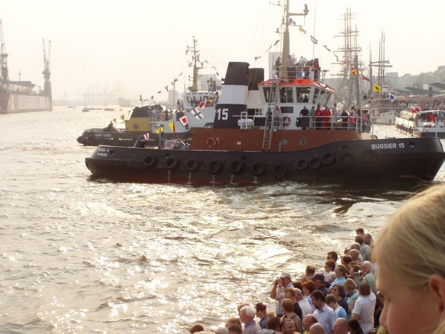 Schlepperballet auf dem Hamburger Hafengeburtstag fotografiert von Christian Möller mit einer Olympus C-725. IMO Number: 9021112 MMSI Number: 211216480 Callsign: DABK Length: 28 m Beam: 9 m